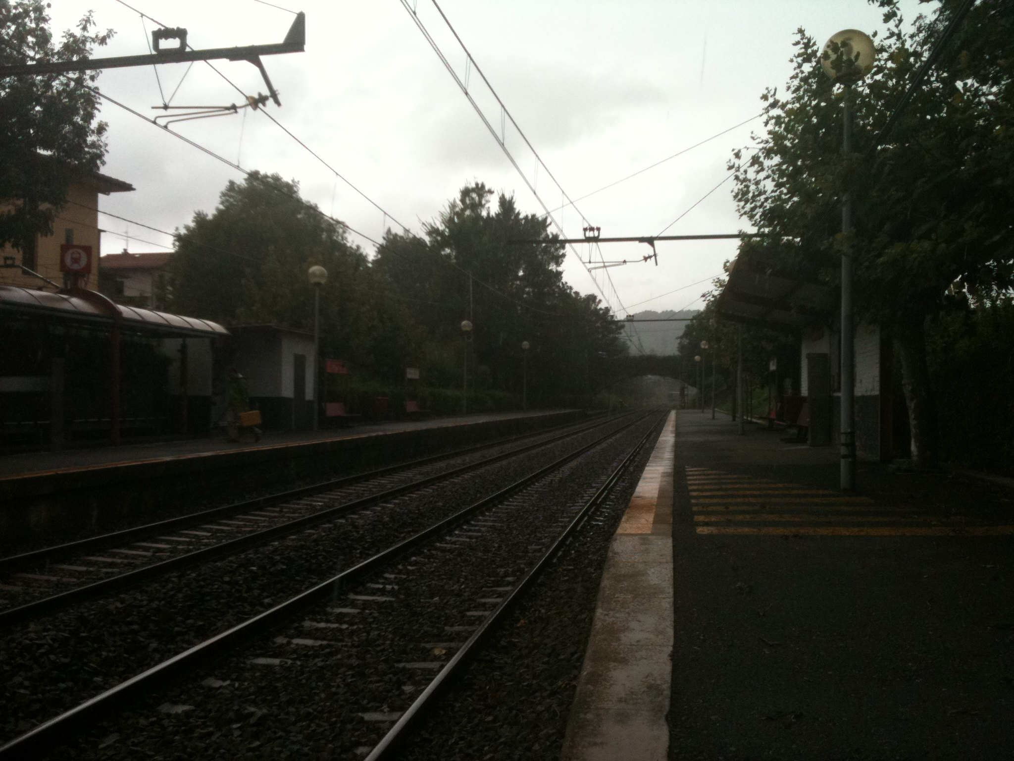 Vista de la estación